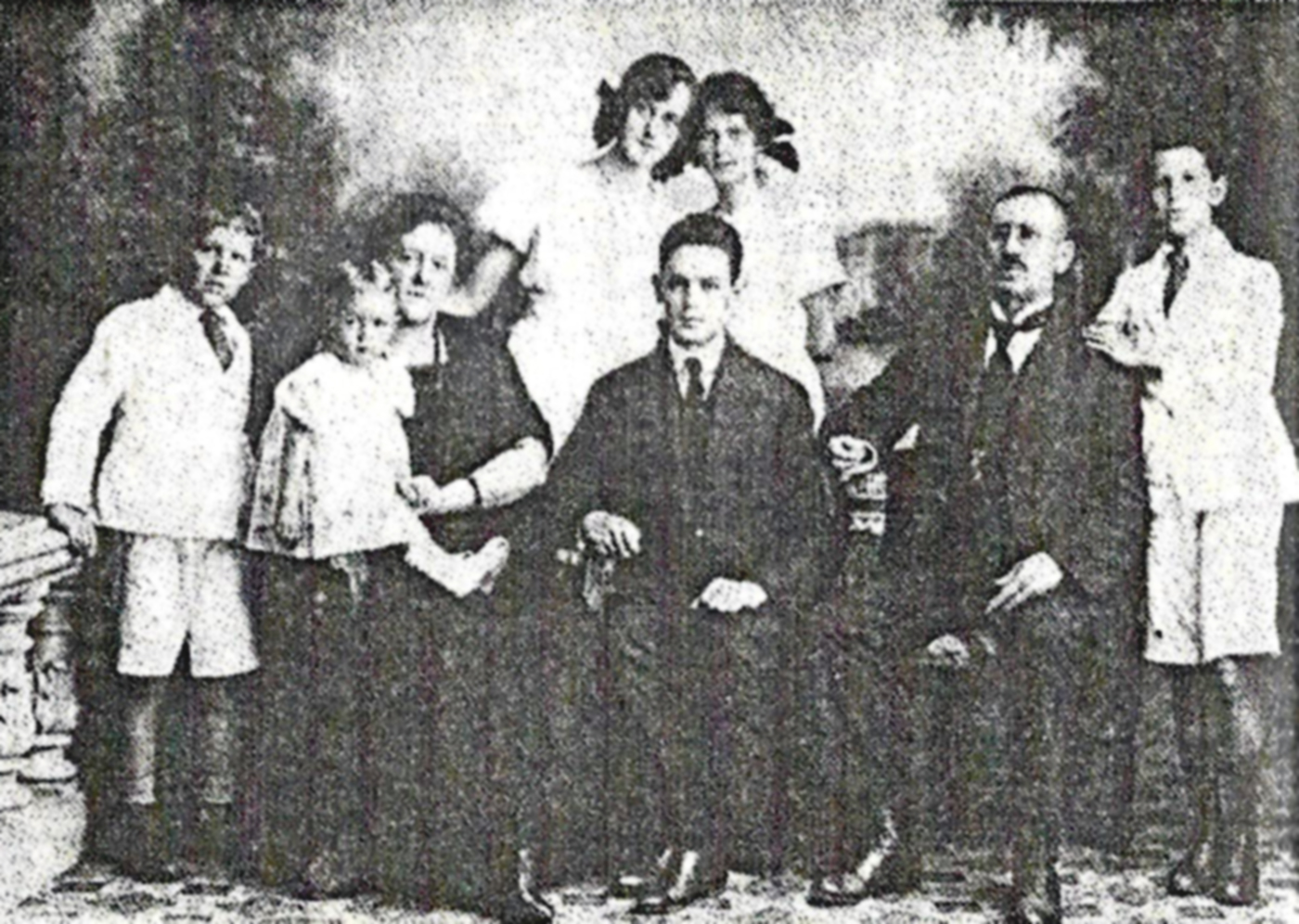 José Antônio Picoral, a esposa Juana Mathilde Mayer e alguns filhos.